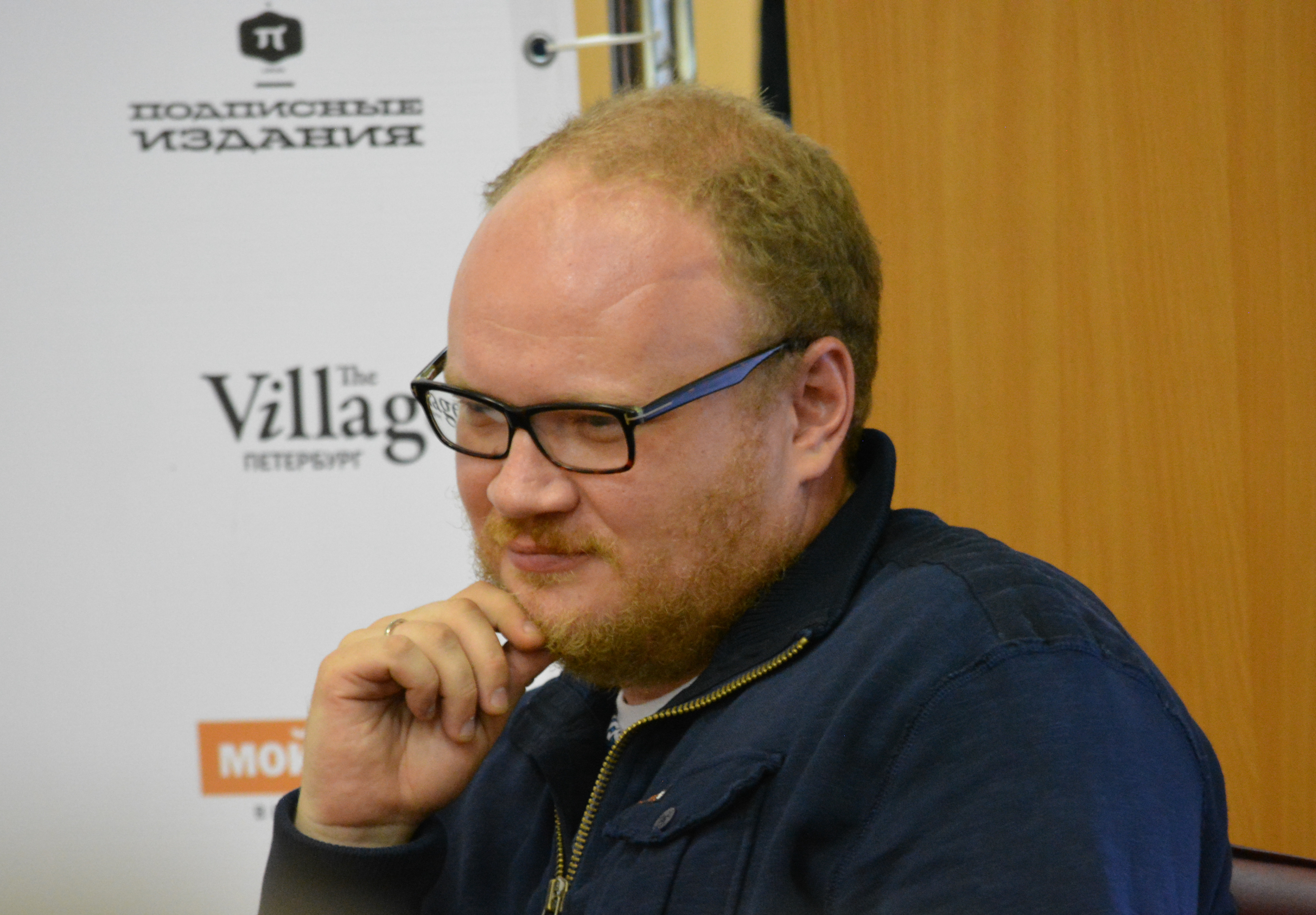 Олег Кашин на дебатах в рамках «Открытой библиотеки» в Центральной городской публичной библиотеке им. В. В. Маяковского (Санкт-Петербург) 27 сентября 2014 года